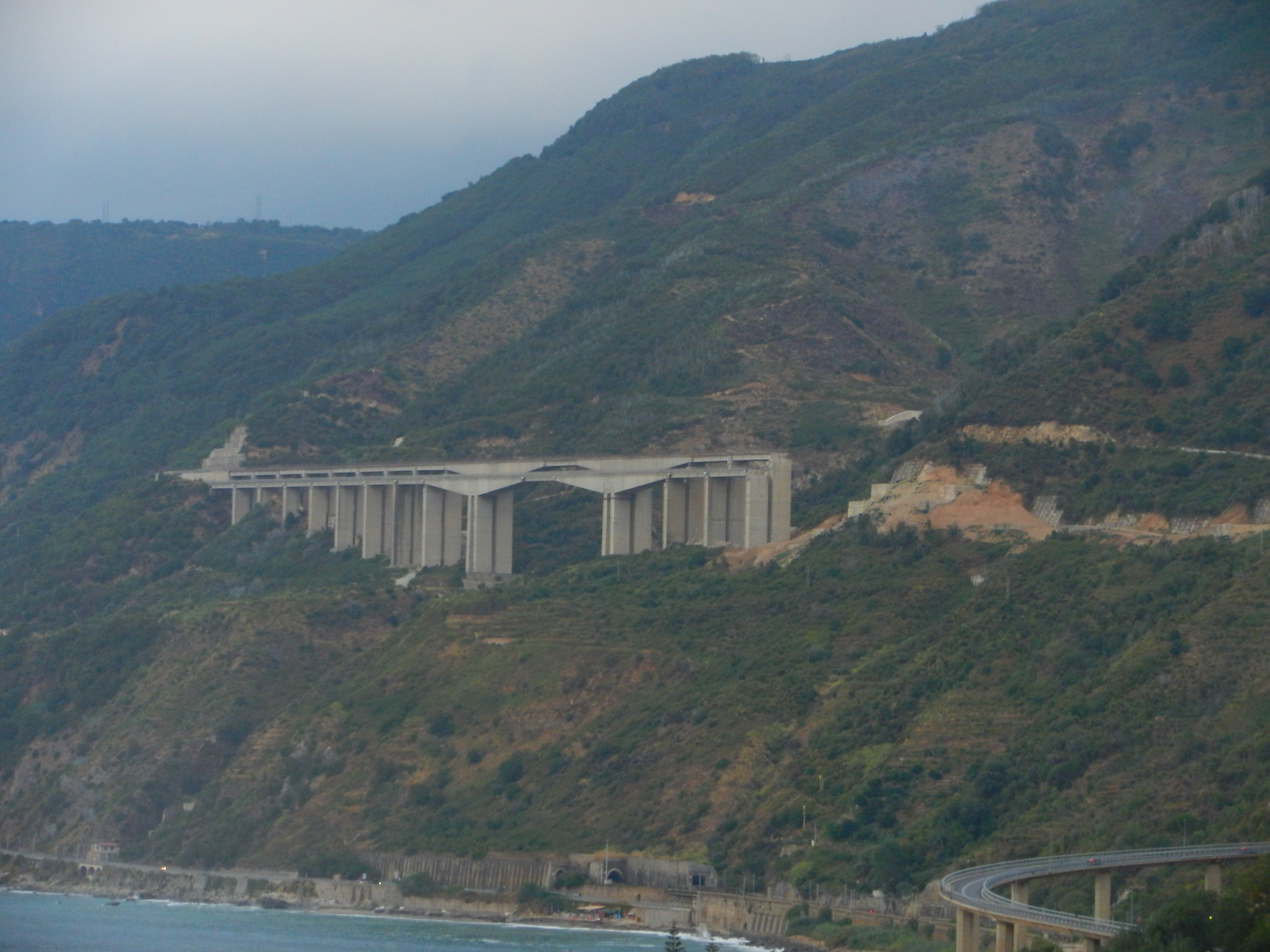 Uno dei viadotti della vecchia tratta dell'autostrada A3, Bagnara-Scilla. La tratta è stata sostituita con una nuova e dunque si è deciso di demolirla. Il viadotto nella foto è stato demolito solo parzialmente.